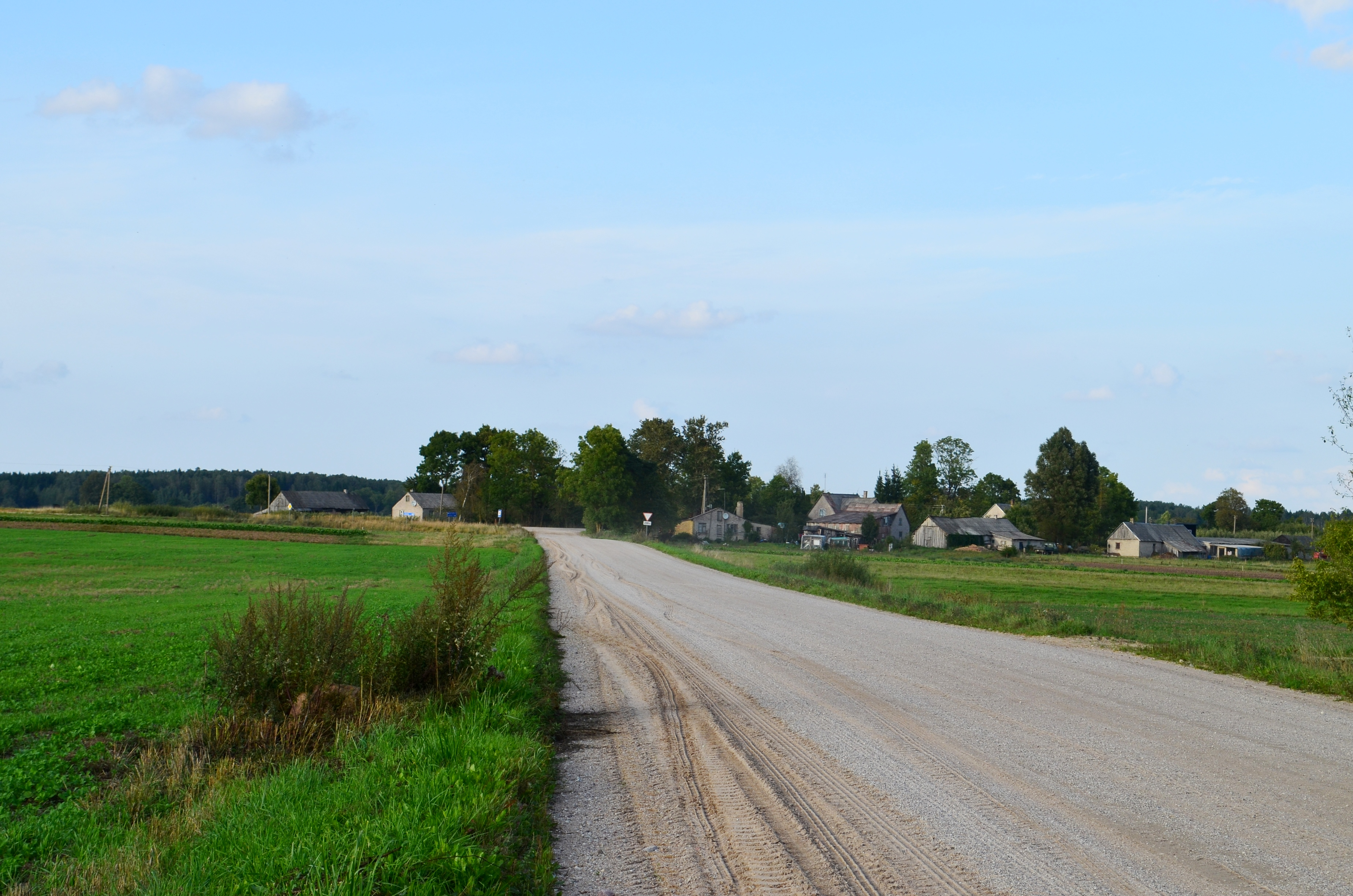 Daujočiai, Radviliškio raj.